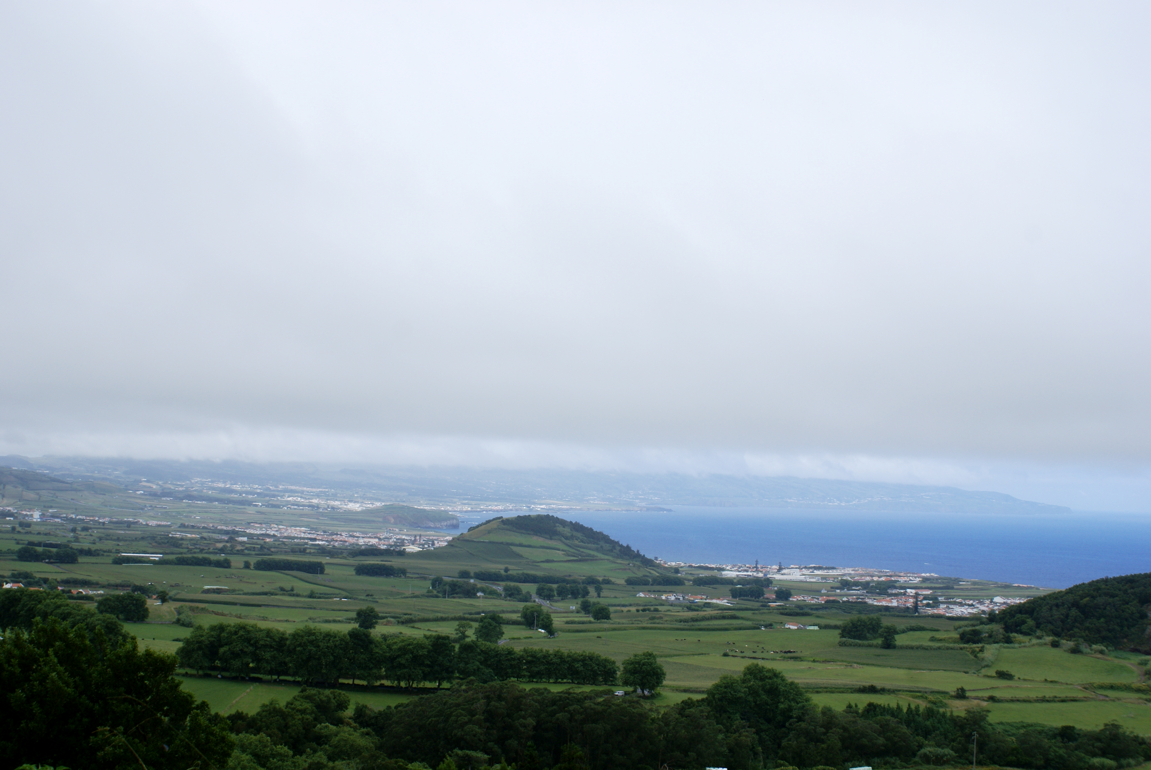 Vista parcial da Ribeirinha, Ribeira Grande, ilha de São Miguel, Açores